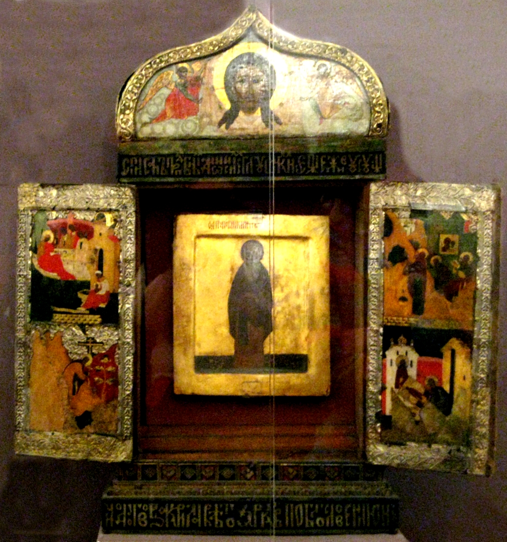 1. Преподобный Кирилл Белозерский. Копия иконы 1424 года. 2. Киот. Мастер Никита Ермолов, 1614 год. Надпись: "Образ чудотворца Кирилла списан преподобным Дионисием Глушицким, ещё живу сущу чудотворцу Кириллу в лето 6932, сделан сий киот в Дом Пречистыя и чудотворца Кирилла в лето 7122 по благословению игумена Матфея в службу Богу, аминь".